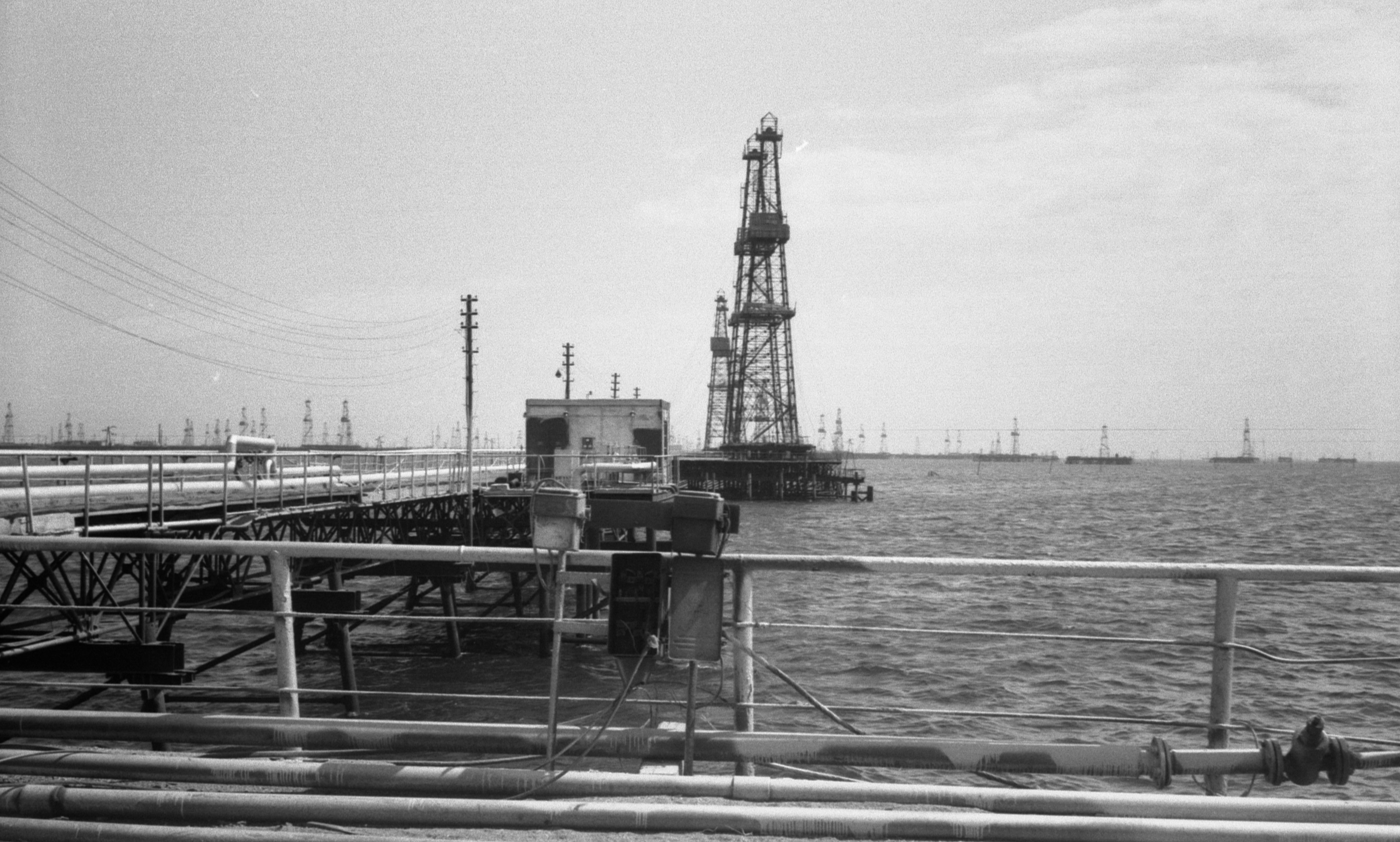 Ölförderanlagen bei Baku Frühling 1987